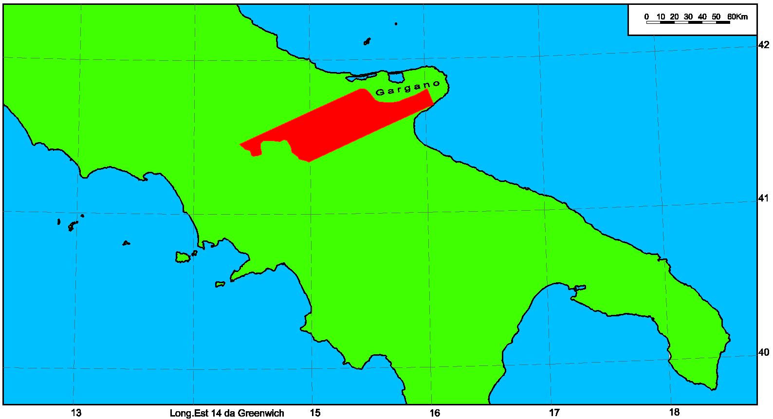 Canne nella zona d'ombra del Gargano all'alba del 2 agosto 216 a.C.